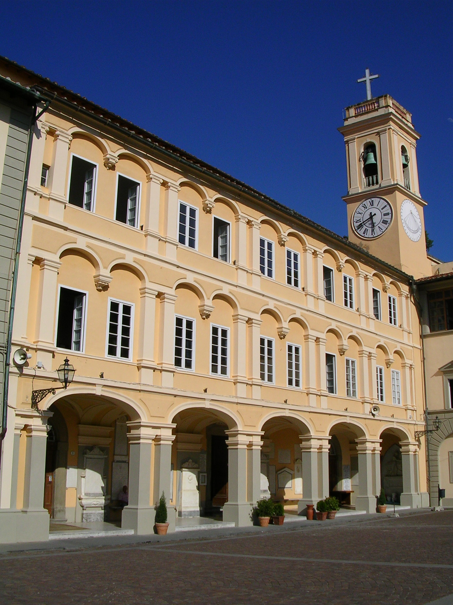 Livorno: il Santuario della Madonna delle Grazie sul colle di Montenero, che deve l'aspetto attuale ad interventi settecenteschi.